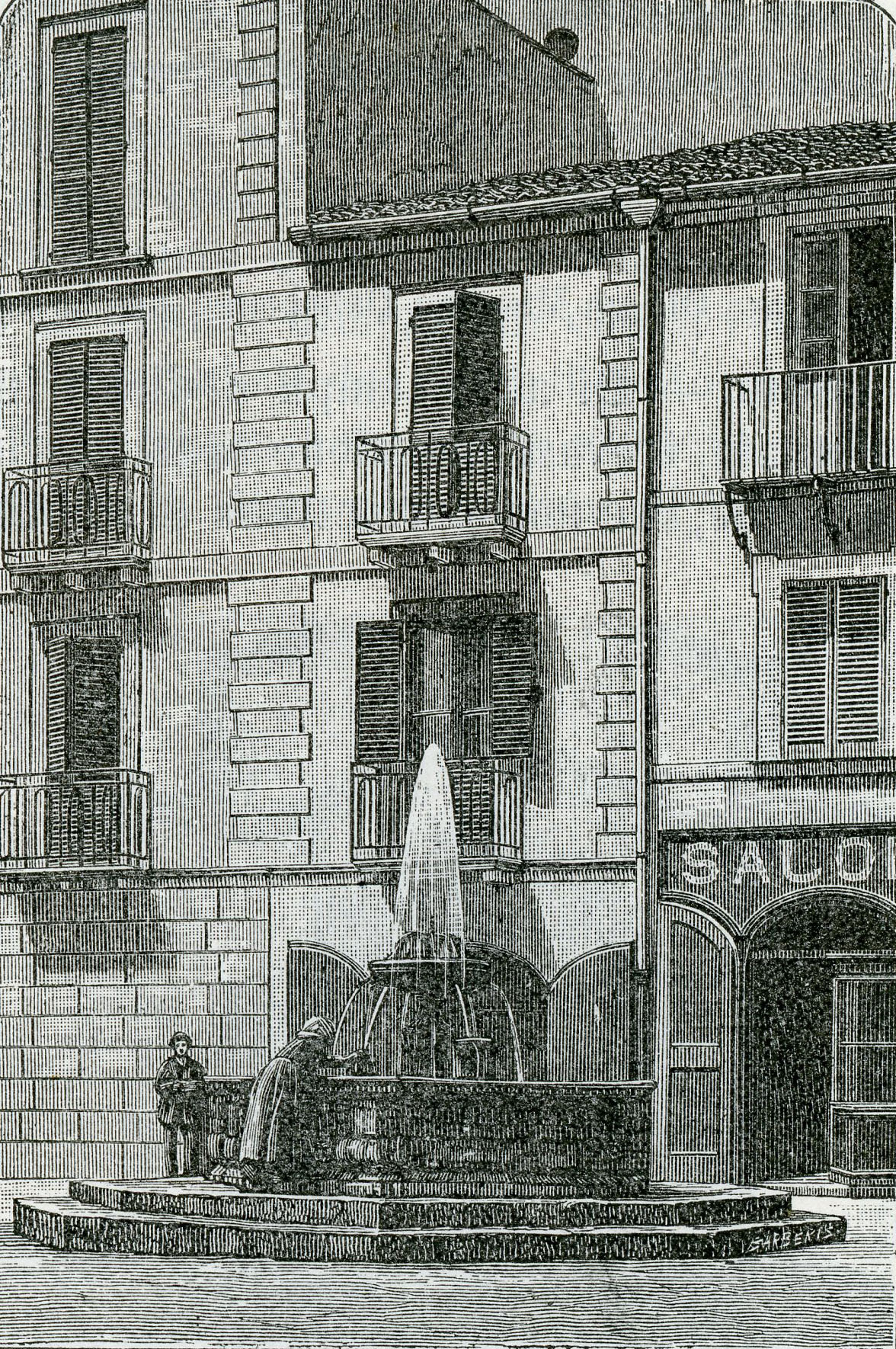 Vasto: fontana del Largo L. V. Pudente (xilografia di Barberis 1898).